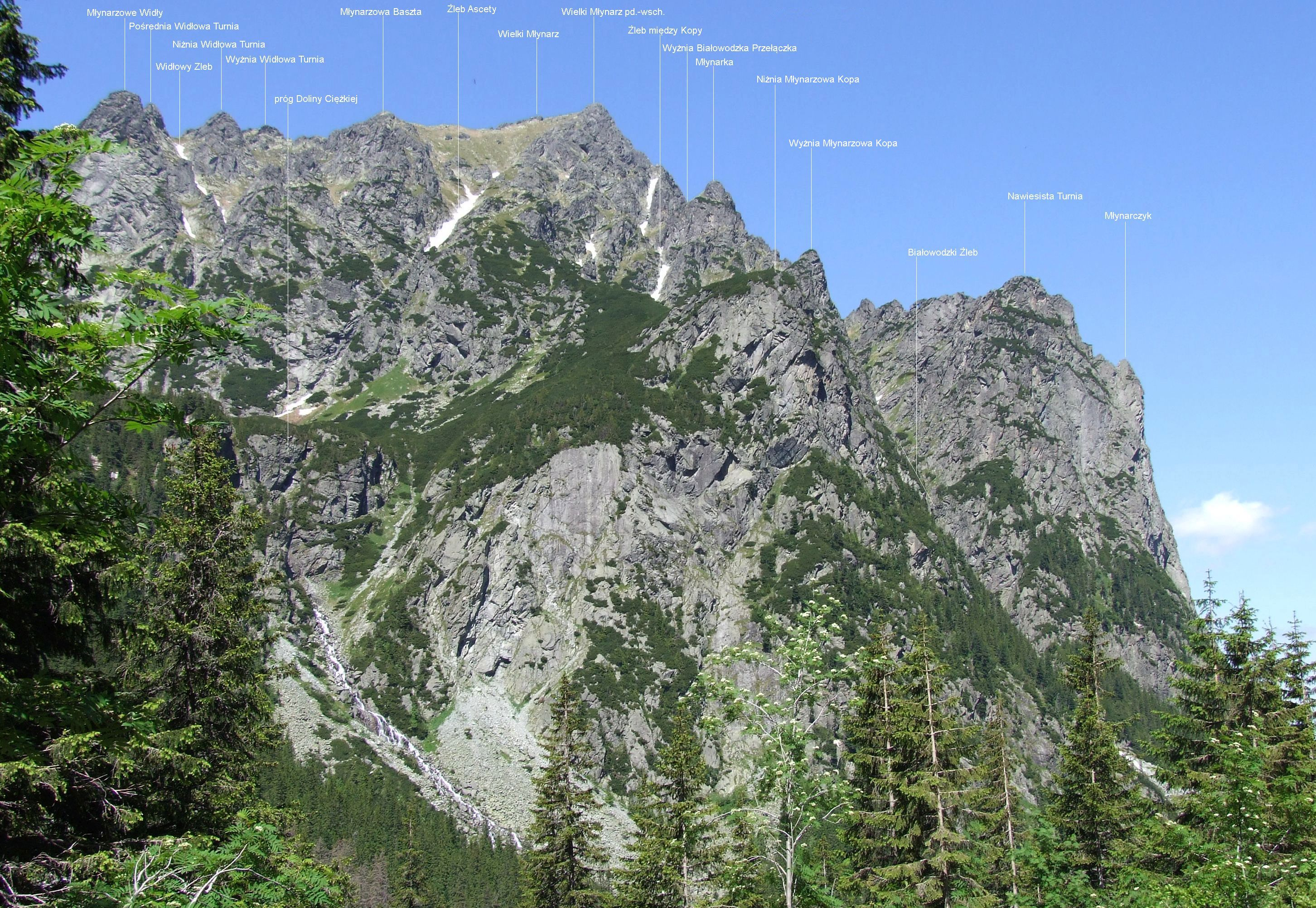 Widok z Doliny Litworowej